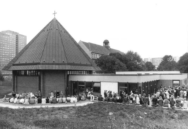 ADN-ZB-Zimmermann-8.9.84-St.- Berlin: Das Evangelische Gemeindezentrum in der Paul-Junius-Str. - Ecke Ho-Chi-Minh-Str. wurde mit einem feierlichen Gottesdienst übergeben.